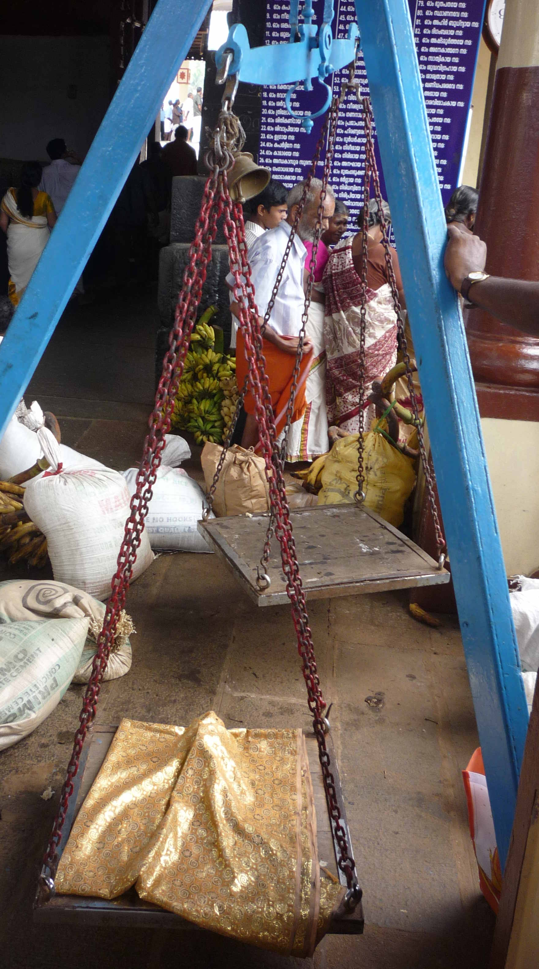 തുലാഭാരം നടത്തുന്നതിനുപയോഗിക്കുന്ന ത്രാസ്